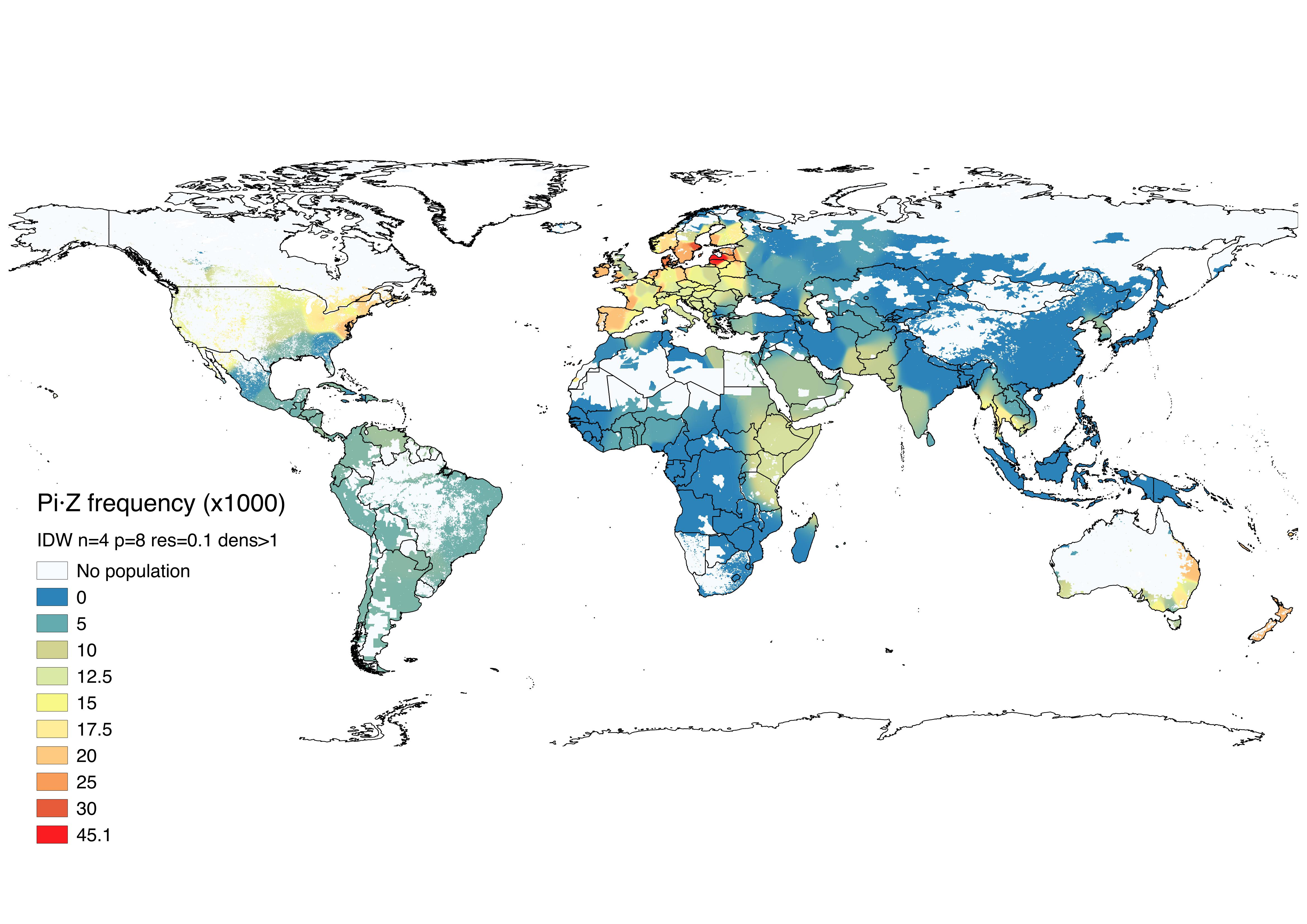 Prevalencia de genotipos Pi * ZZ en el mundo, interpolación IDW